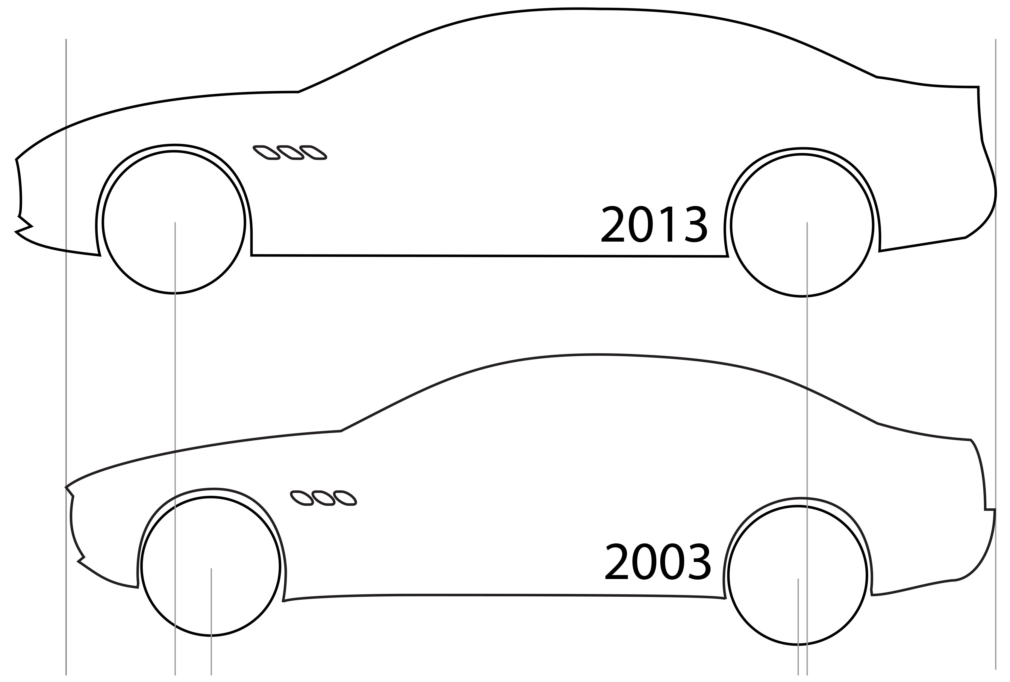 Differenze di linea e dimensioni fra una Maserati Quattroporte V (2003) e una Quattroporte VI (2013)